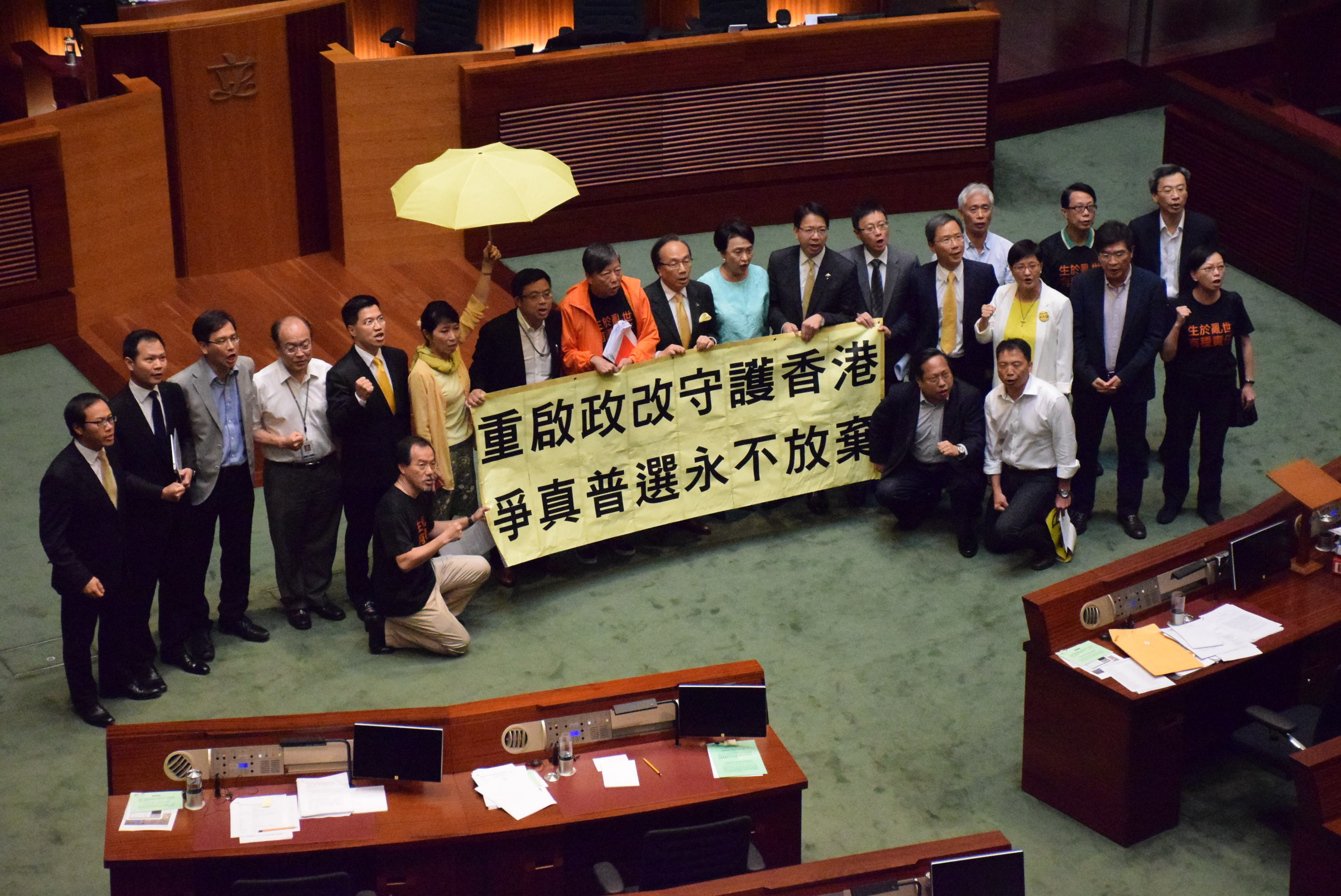 中文（香港）: 20多位泛民主派立法會議員在港府政改方案被否決後，到會議廳內主席台前展示標語。（美國之音 湯惠芸攝)